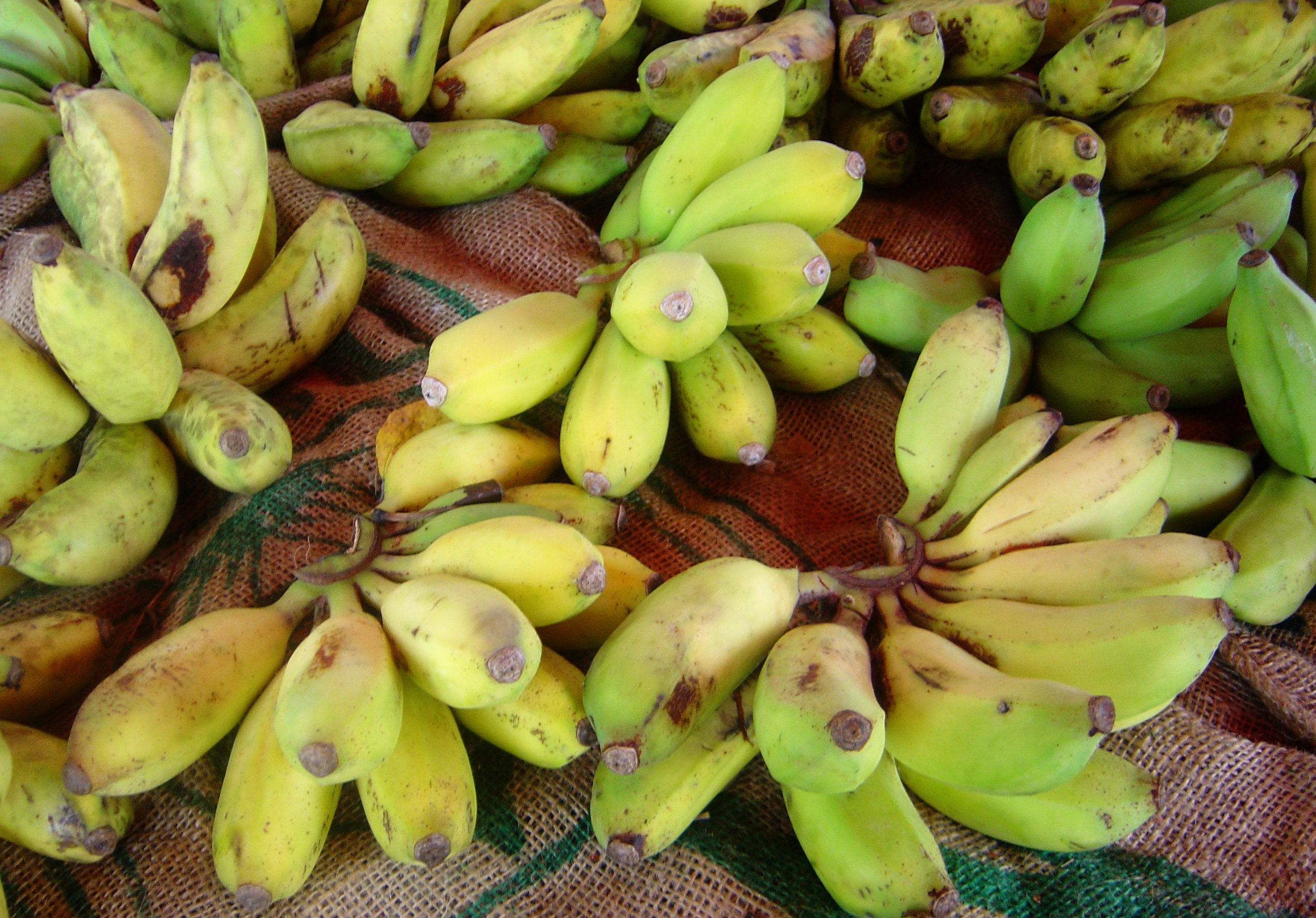 Bananas sold on Réunion Island